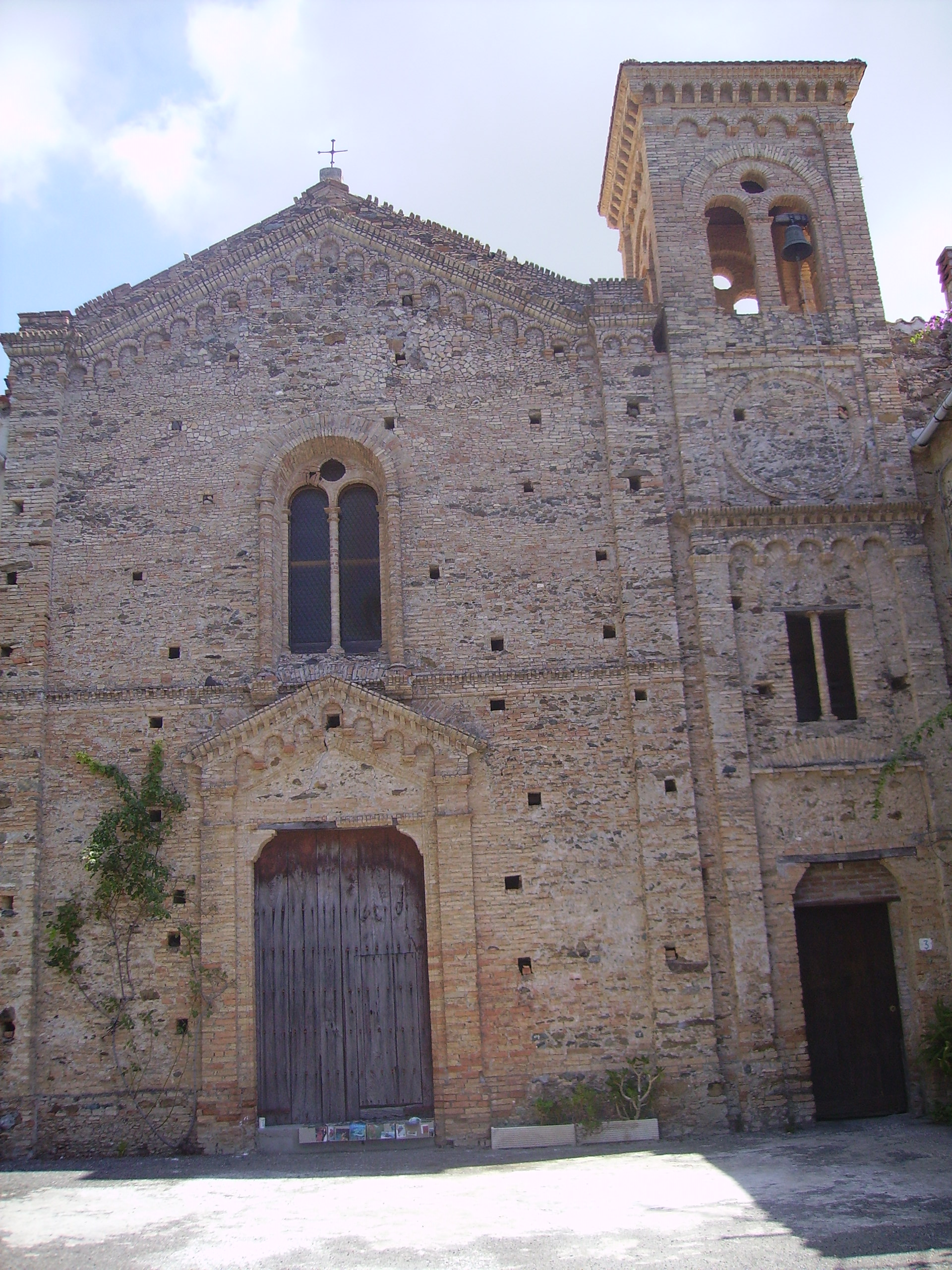 Facciata Cappuccini Belmonte